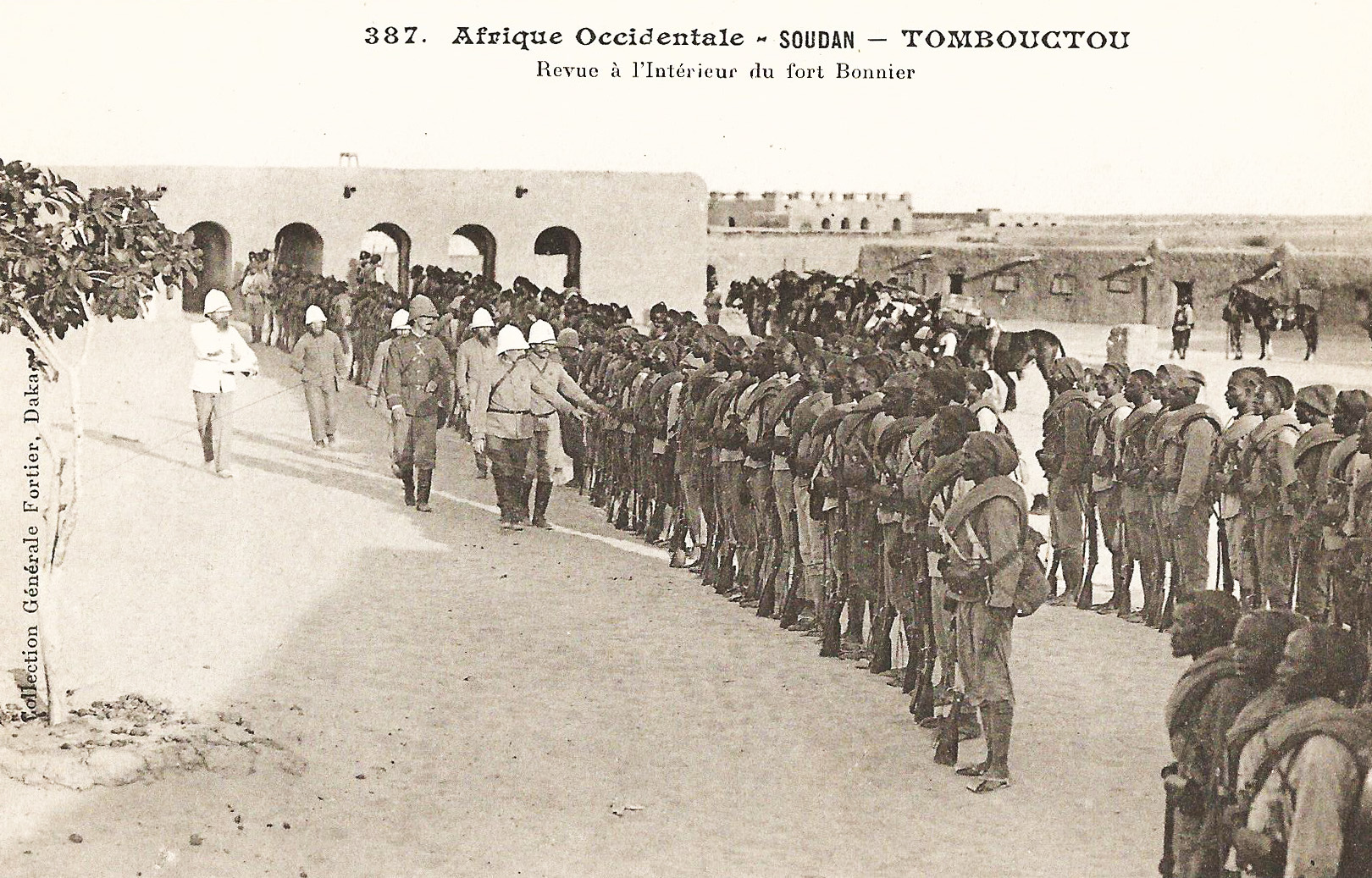 François-Edmond Fortier, Tombouctou. Revue à l'intérieur du fort Bonnier. Afrique Occidentale - Soudan.